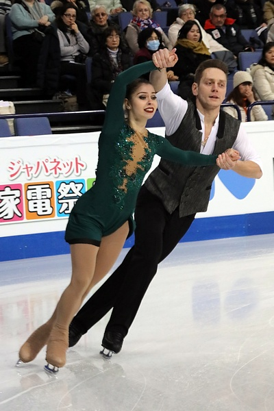 Татьяна Даниловa / Николай Каменчук (Беларусь) на чемпионате мира 2017